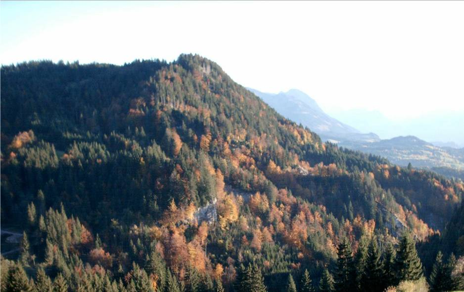 Großer Wald bei Burgberg im Allgäu. Typischer Bergmischwald aus Fichte, Tanne, Buche und Bergahorn.